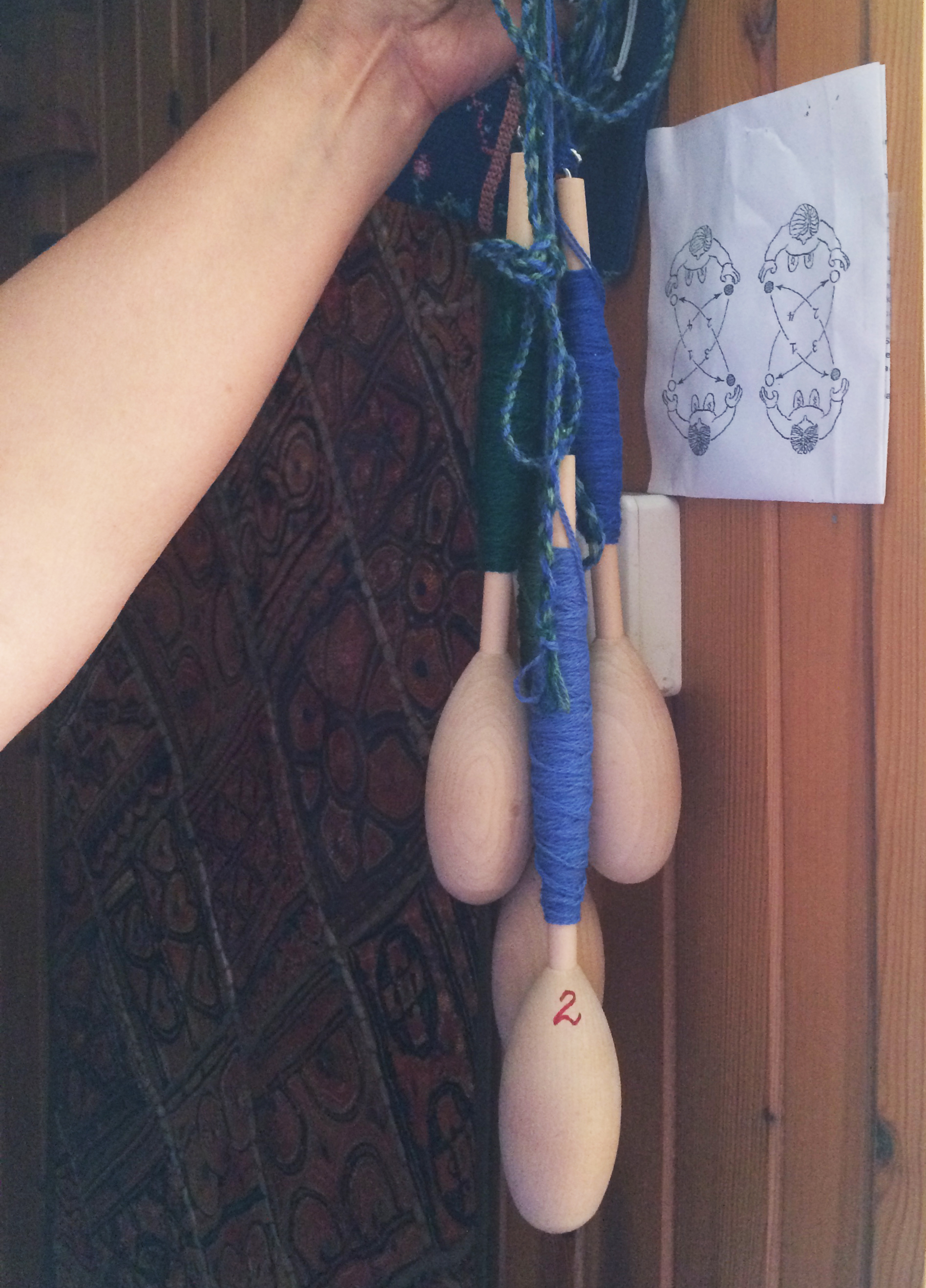 Slyngestokker, eller slingrestokker, brukt til fremstilling av kraftige, firflettede bånd, snorer eller forsyn/liner på fiskeredskap